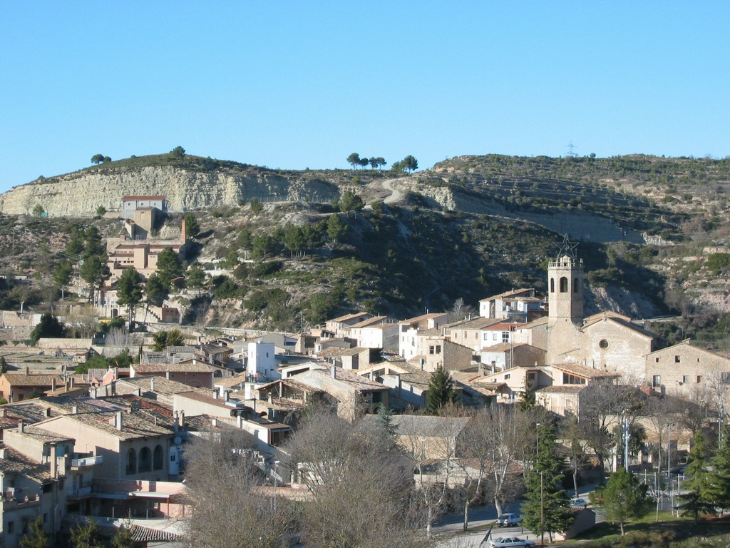 Fotografia parcial de Copons mirant cap al Nord. Any 2006.